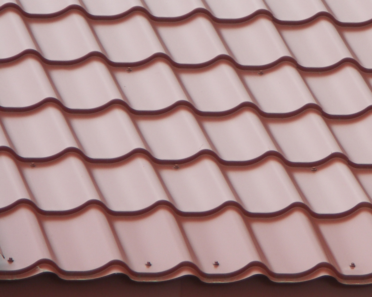 Металлочерепица коричневого цвета